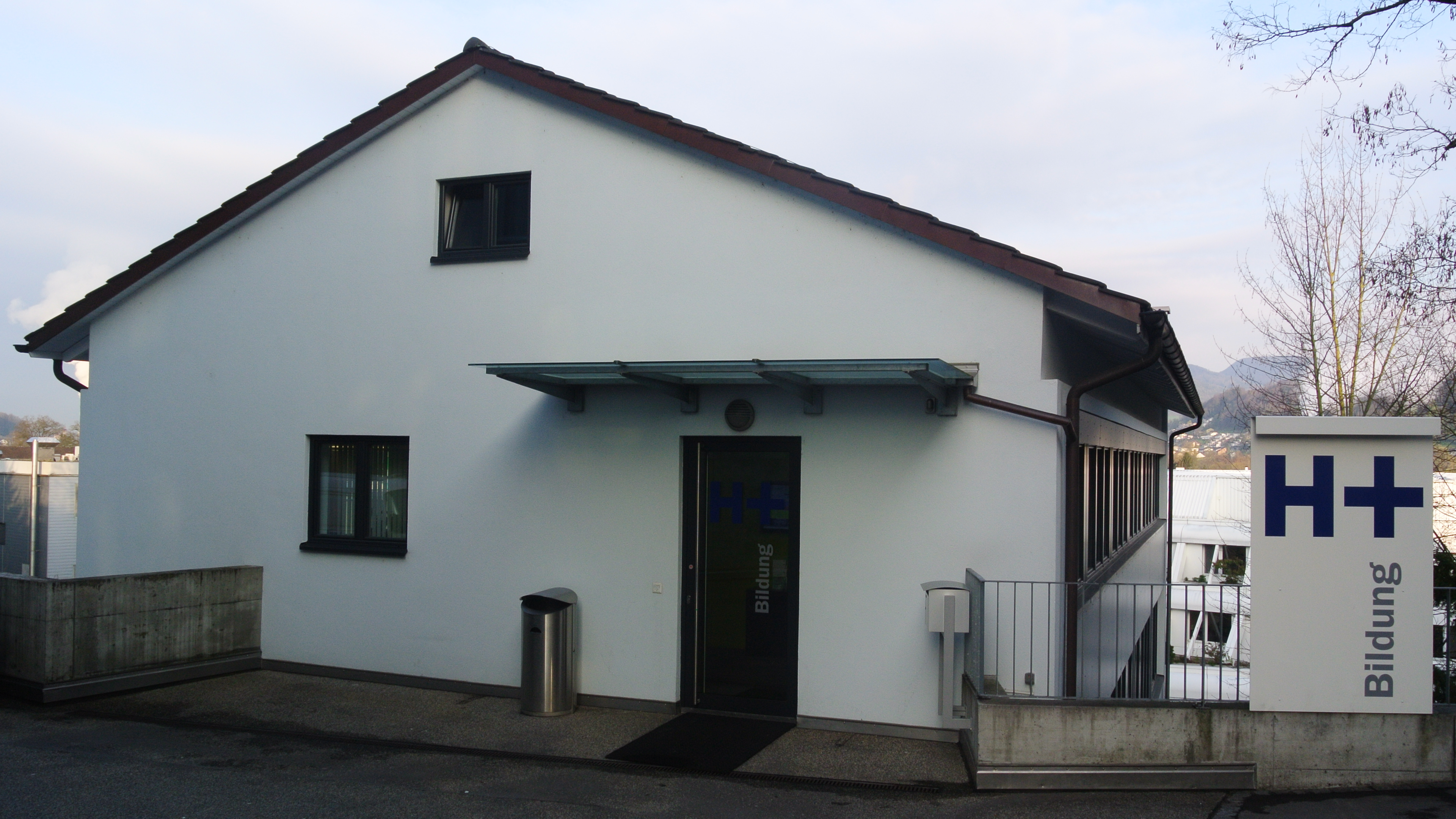 Eingang zum Hauptsitz von H+ Bildung, Rain 36 in Aarau